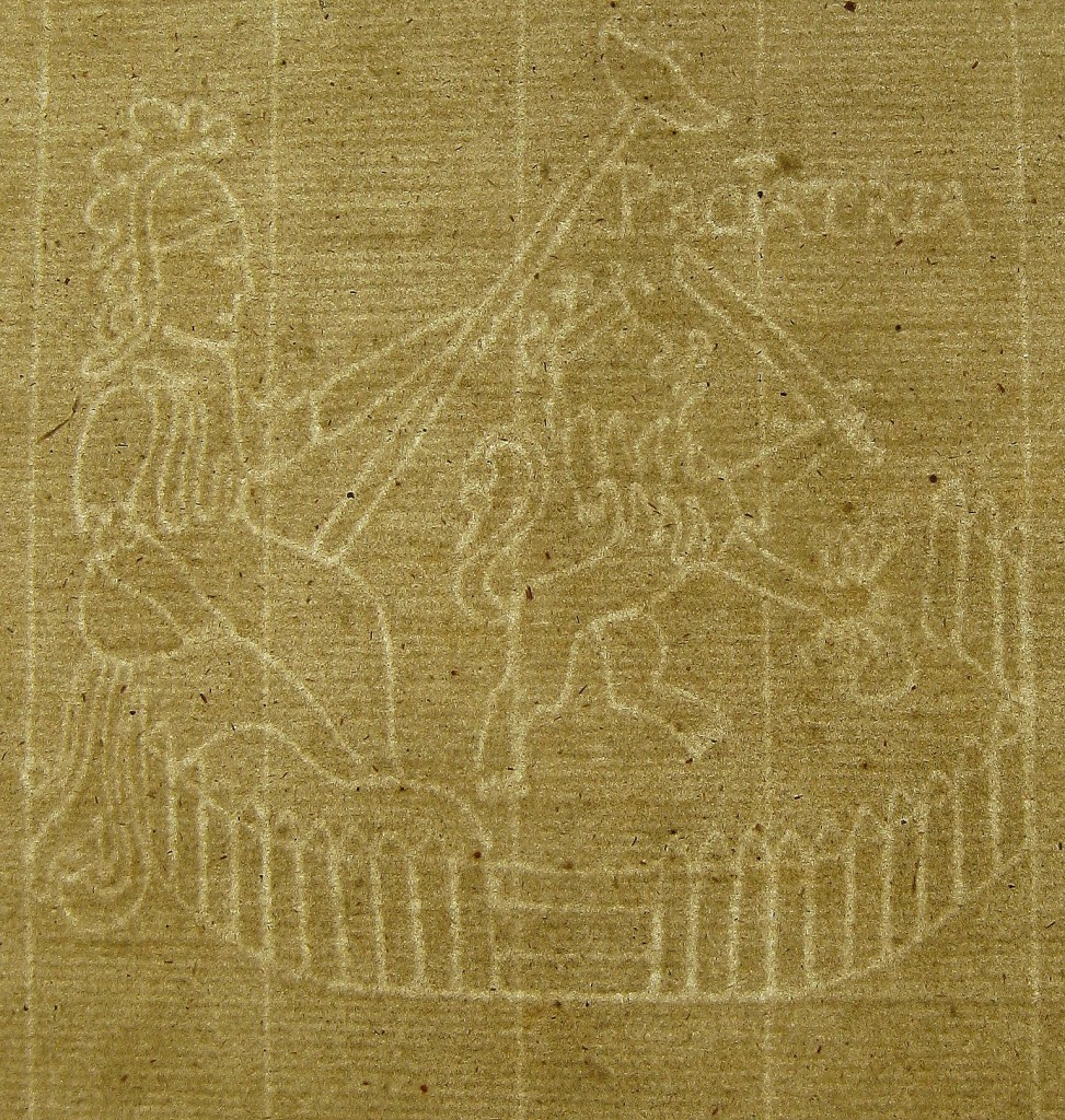 Pro-Patria-Wasserzeichen (Hollandia-Papier)